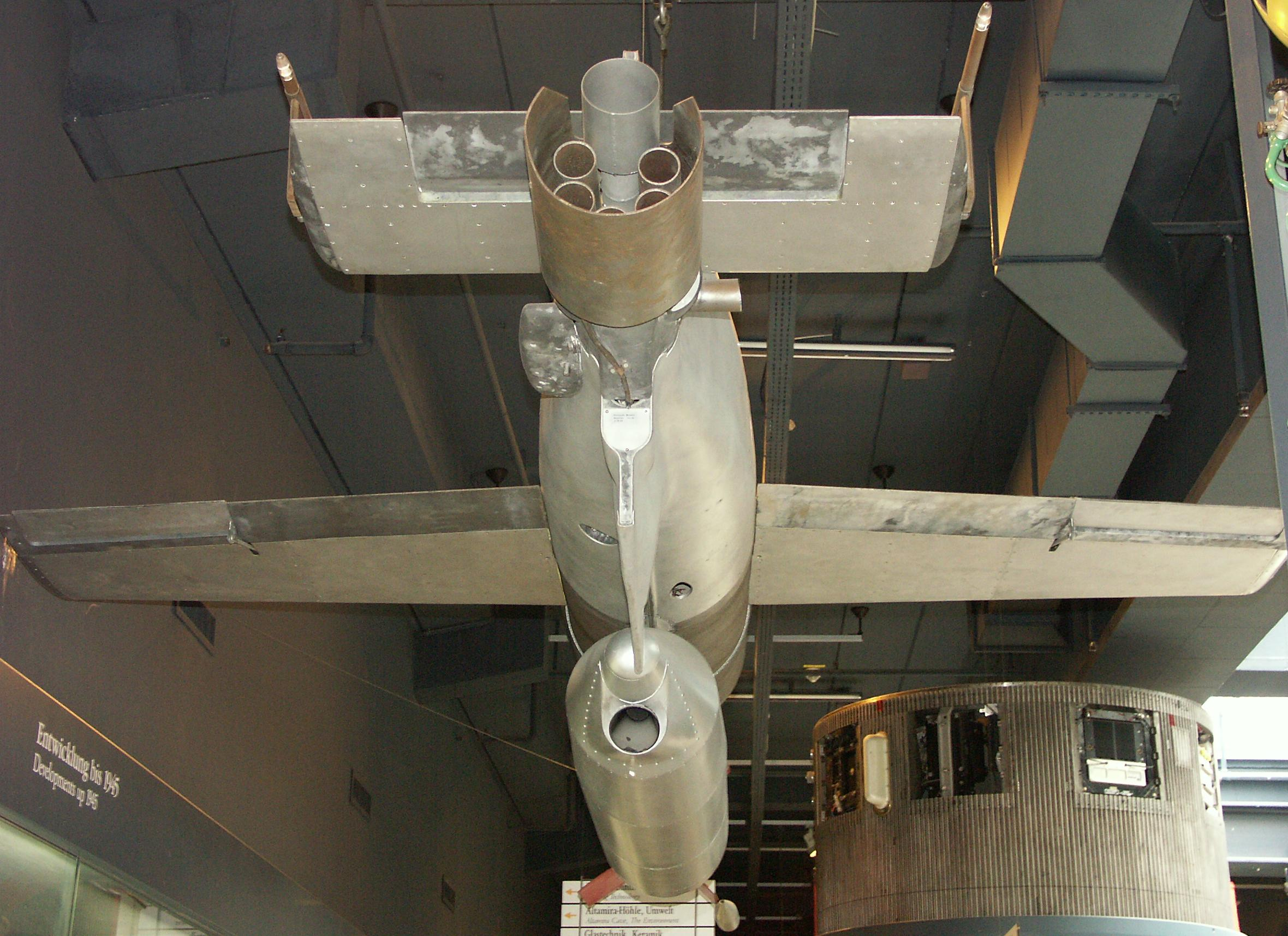 Deutsches Museum Photo par Jean-Patrick Donzey